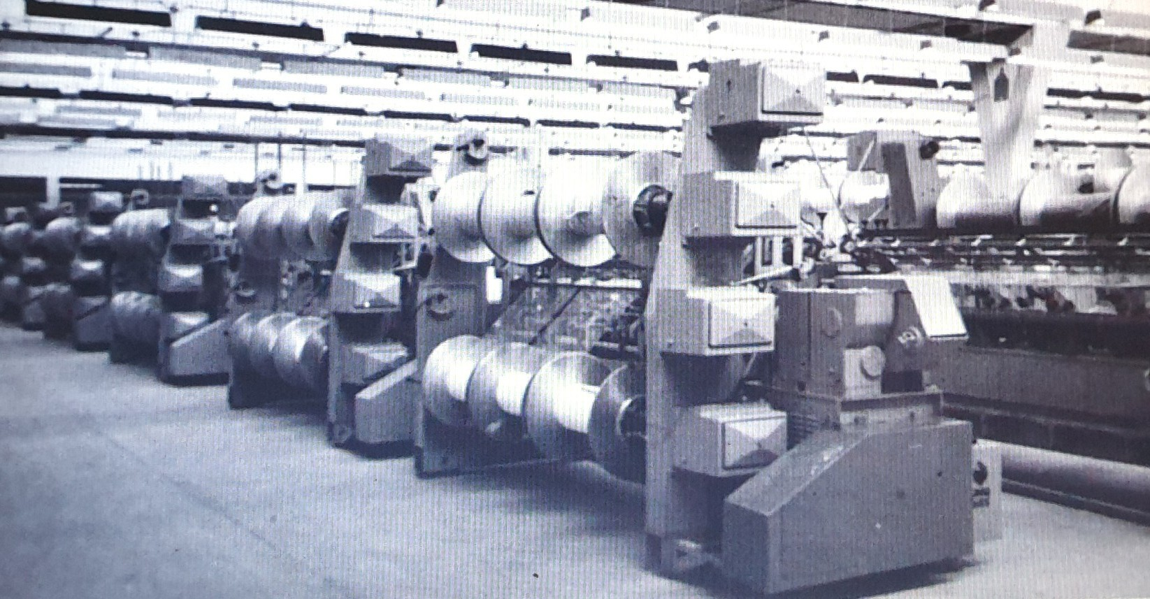 Luxpol Stargard Szczeciński. Wydział dziewiarni